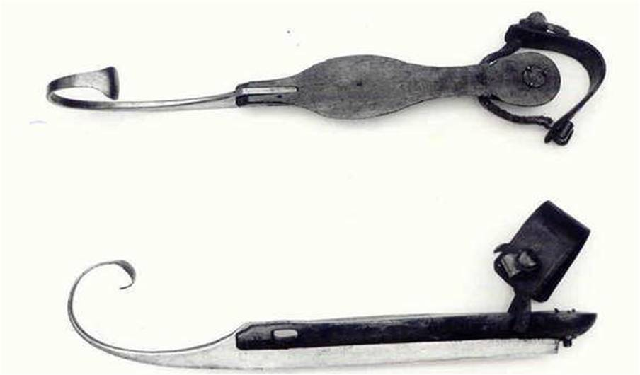 Heulenaars, een schaatstype uit Maasland